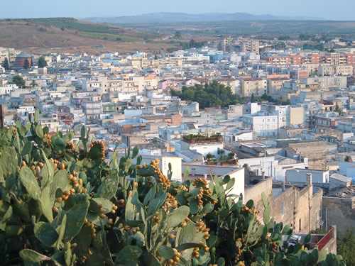 Canosa Panorama. 2007